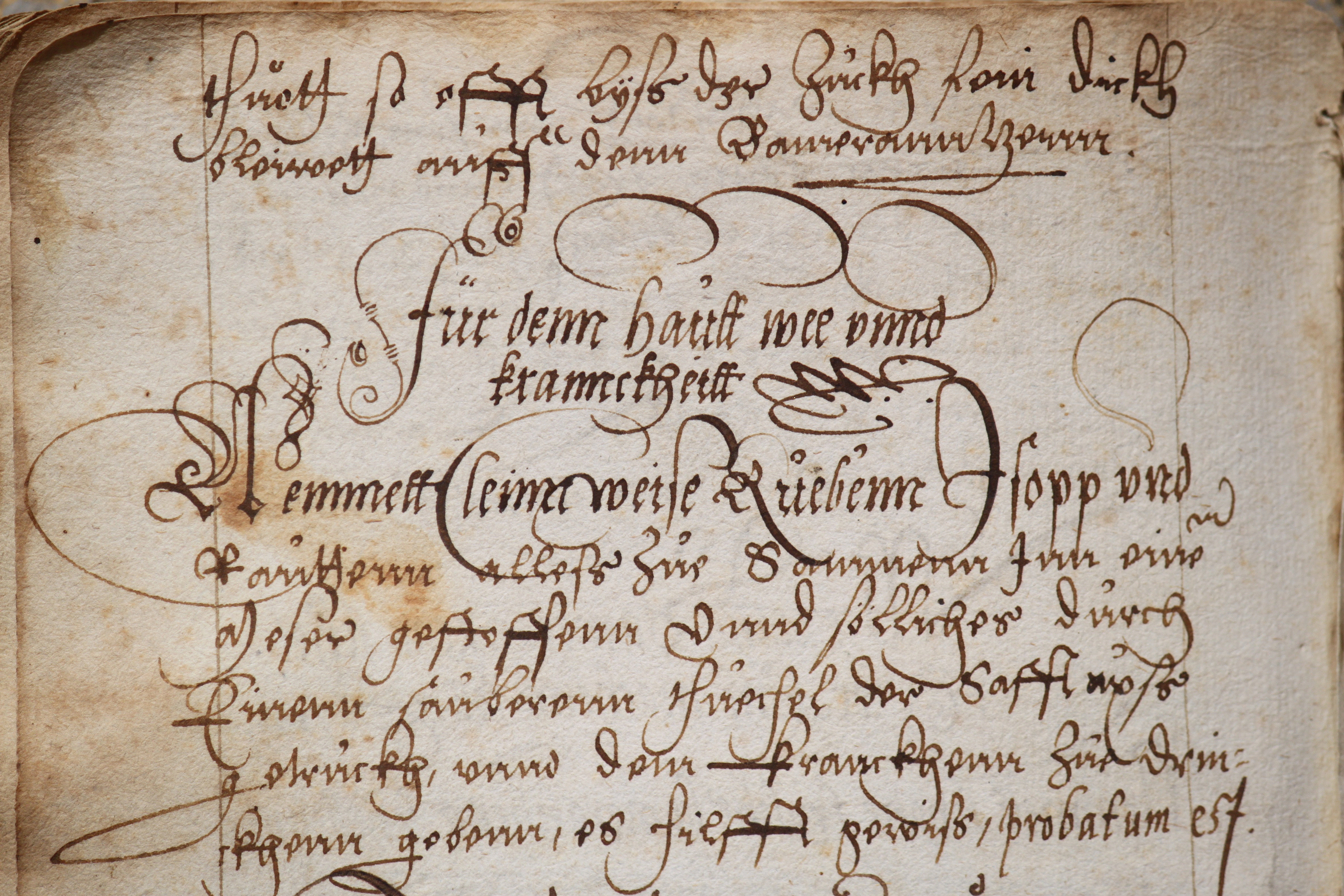 Ein schön Kochbuch 1559, Rezept 122: Für denn haůtt wee unnd krannckheittNemmett Cleine weiſe Růebenn Jſopp und Raůttenn alleß zůe Sammen Jnn eine Meſer geſtoſſenn unnd ſölliches důrch Einenn ſaůberenn thůechel der Safft aůß getrůckh, unnd dem kranckhenn zůe drin= kenn gebenn, es hilfft gewiß, probatum est.